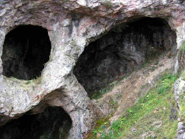 Description/ Descripción: Surroundings of Riosa, Principado de Asturias, Spain. Location of Rioseco mines. Texeo prehistoric mines discovered by Alejandro Van Straalem and operated by The Aramo Cooper Minas Ltd./ Entorno de Riosa, Principado de Asturias, España. Ubicación de las Minas de Rioseco. Minas prehistóricas de Texeo descubiertas por Alejandro Van Straalem y explotadas por The Aramo Cooper Minas Ltd.Minas de hulla explotadas por Ensidesa en la decada de 1960 y actualmente (2006) por HUNOSA Source/ Fuente: Self taken / Autorealizadas o particulares. Date/ Fecha: Novembre 2005/ Noviembre 2005 Publication Date/ Fecha de publicación: January 2006/Enero 2006 Author/ Autor: Photographs provided by Honorino Gonzalez, GRUCOMI and published by Arbeyu/ Facilitadas por Honorino Gonzalez, GRUCOMI y publicadas por Arbeyu.